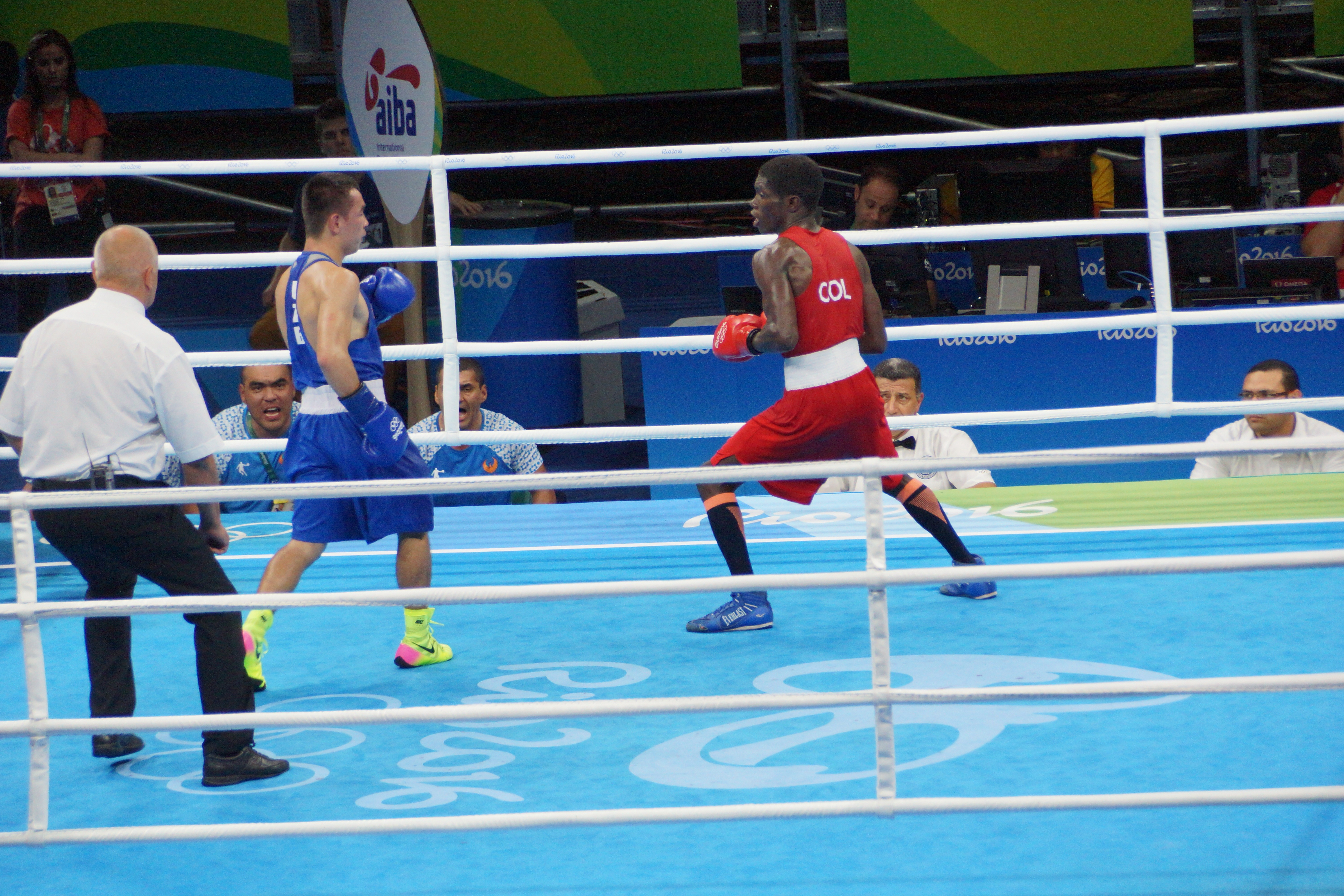 slt.a-77